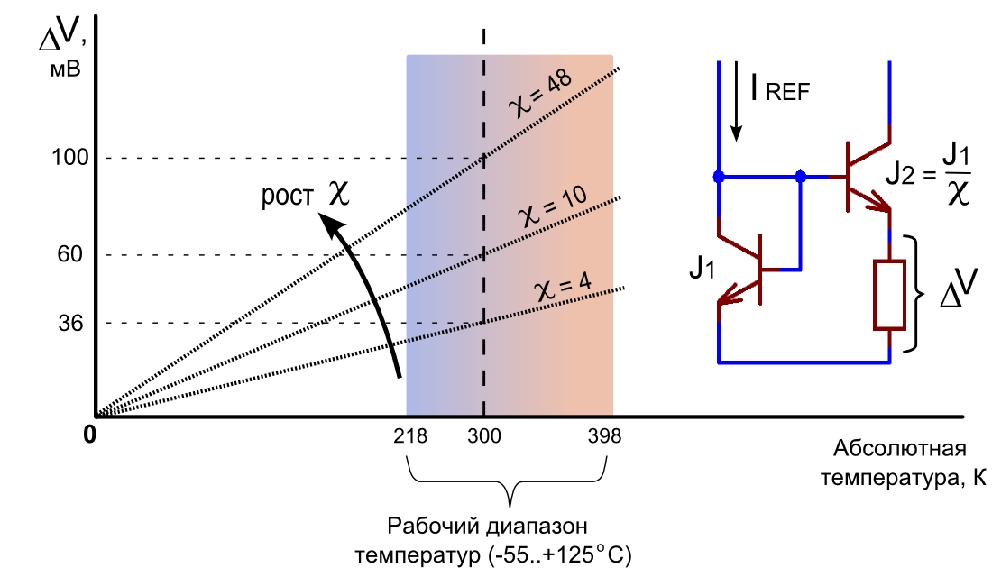 Простейший PTAT-элемент на модифицированном токовом зеркале. Зависимость напряжения от температуры и отношения плотностей токов